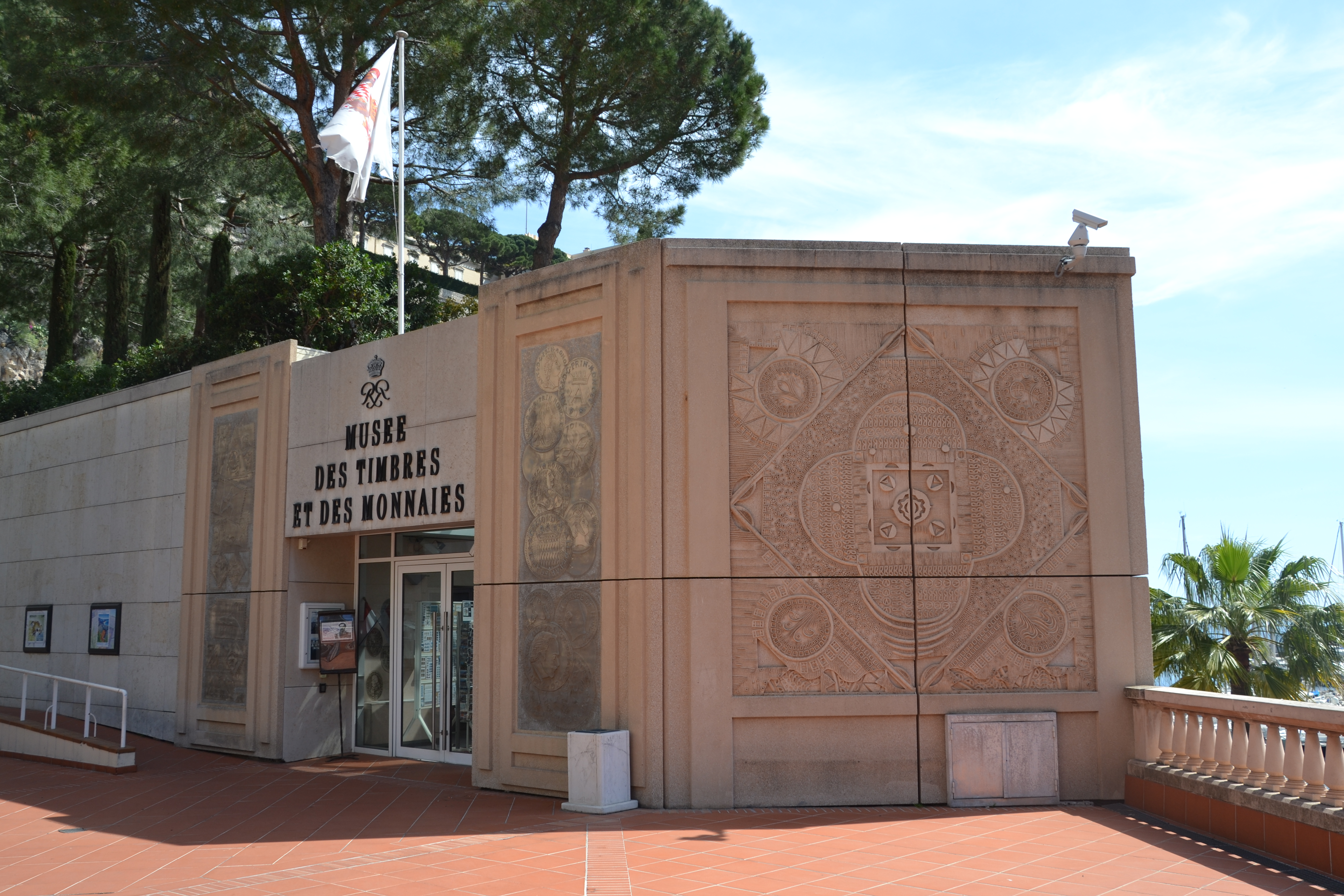 Musée des timbres et des monnaies de Monaco